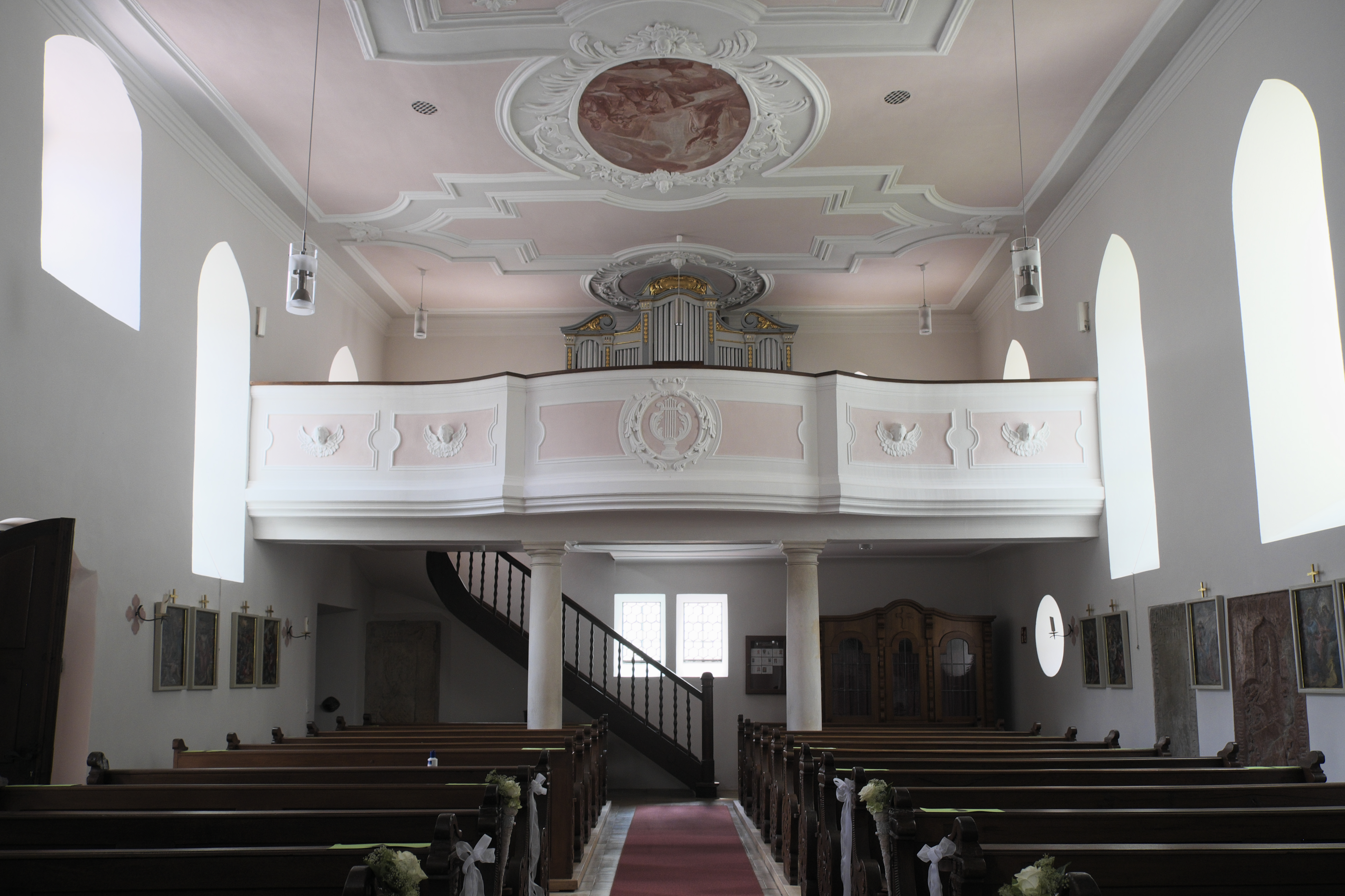 Ehemalige Johanniterkirche, heutige Pfarrkirche St. Johannes in Altmühlmünster (Riedenburg) im niederbayerischen Landkreis Kelheim (Bayern/Deutschland), Stuckdekor